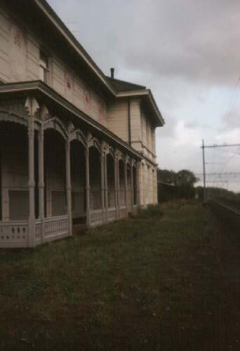 Station Vogelenzang-Bennebroek